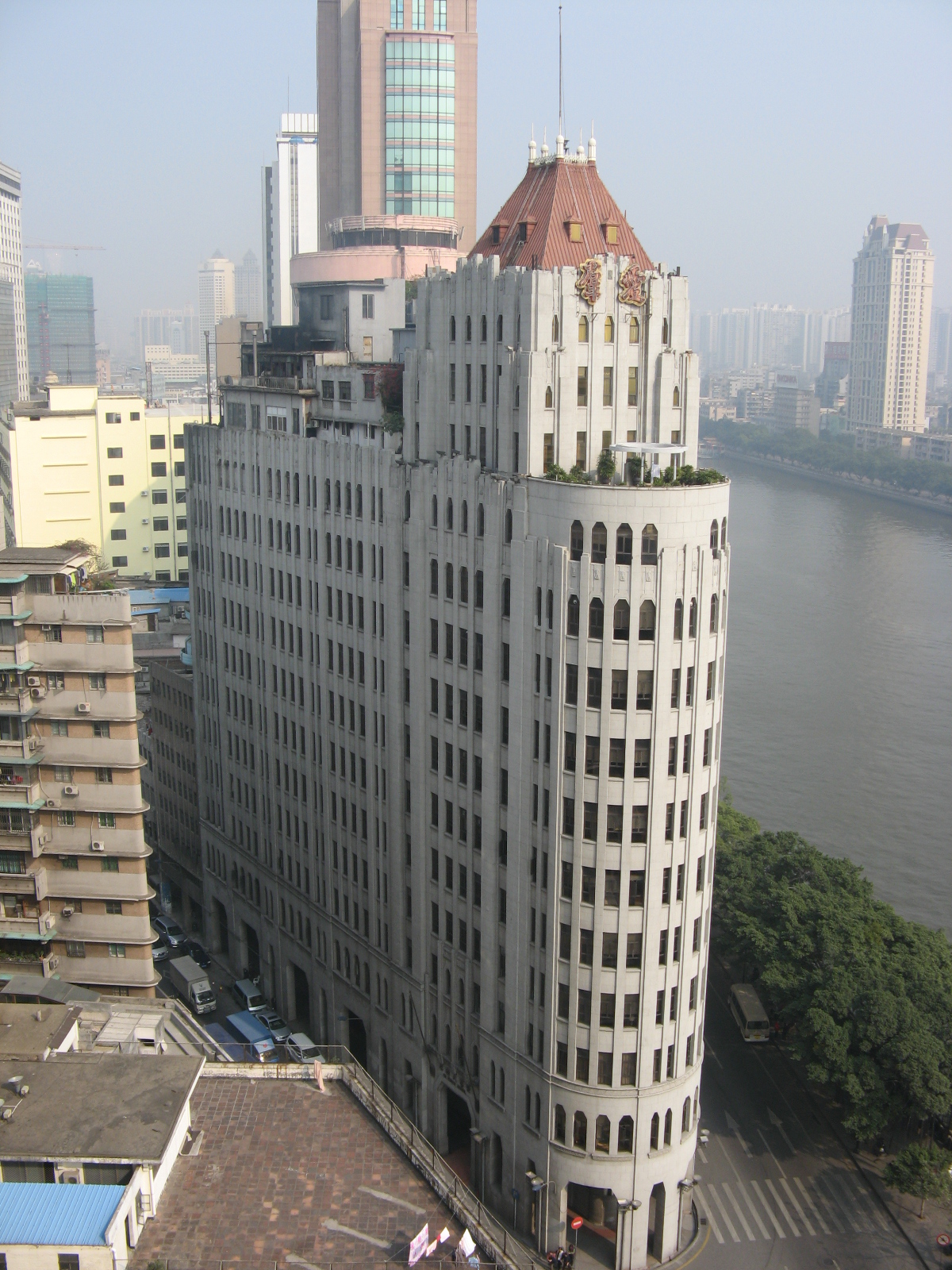 位于中国广州市的爱群大酒店